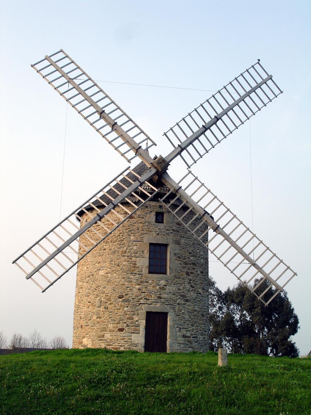 Moulin de Lancieux (Côtes-d'Armor), France